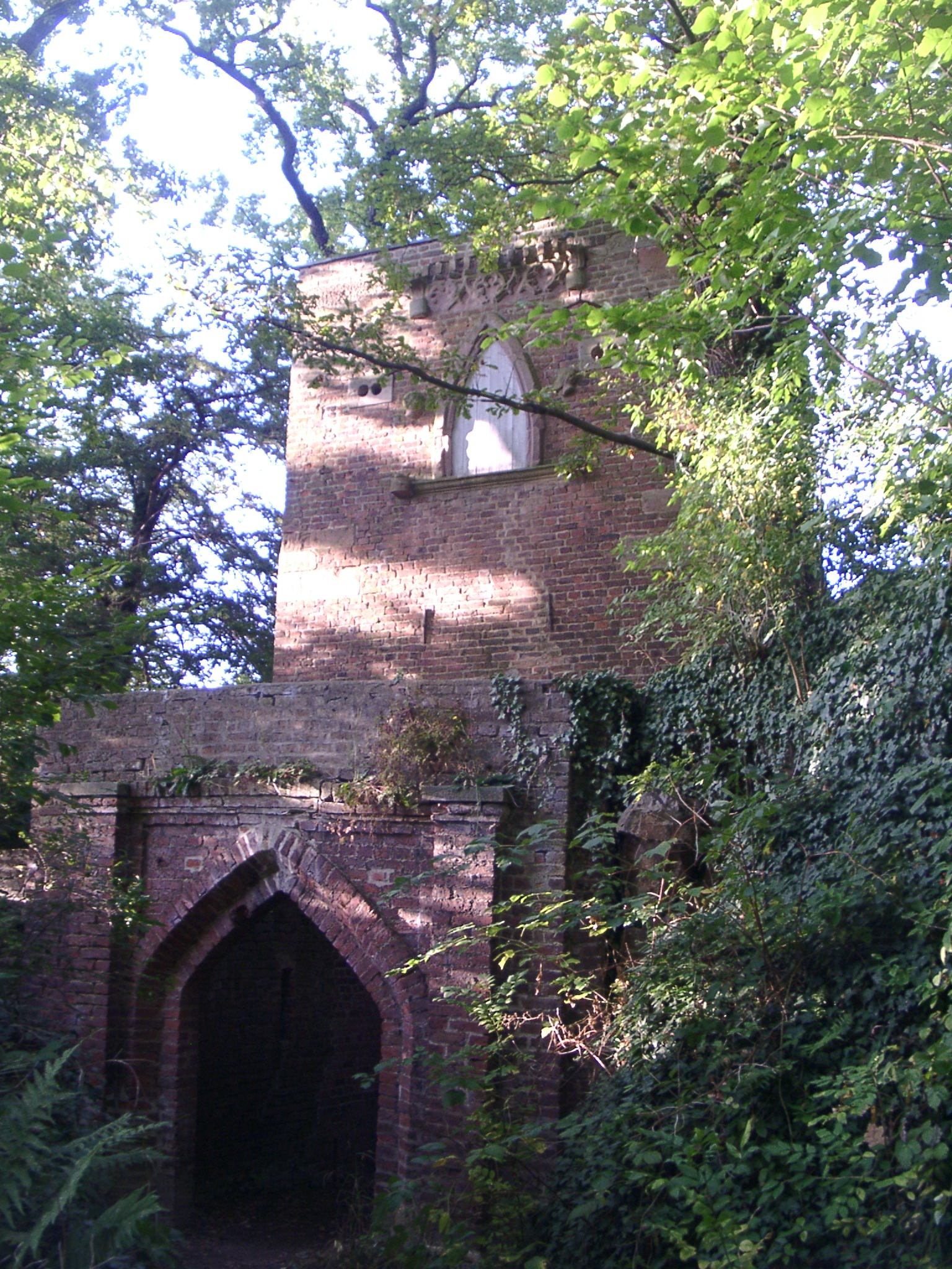 Schillingspark